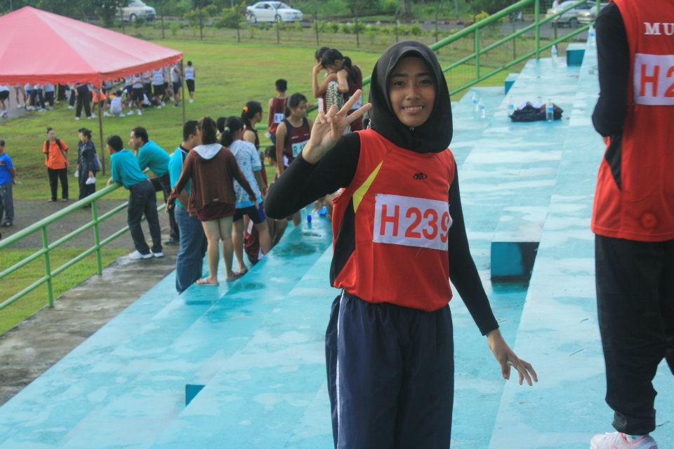 Atlit SMKAI mewakili Sarawak